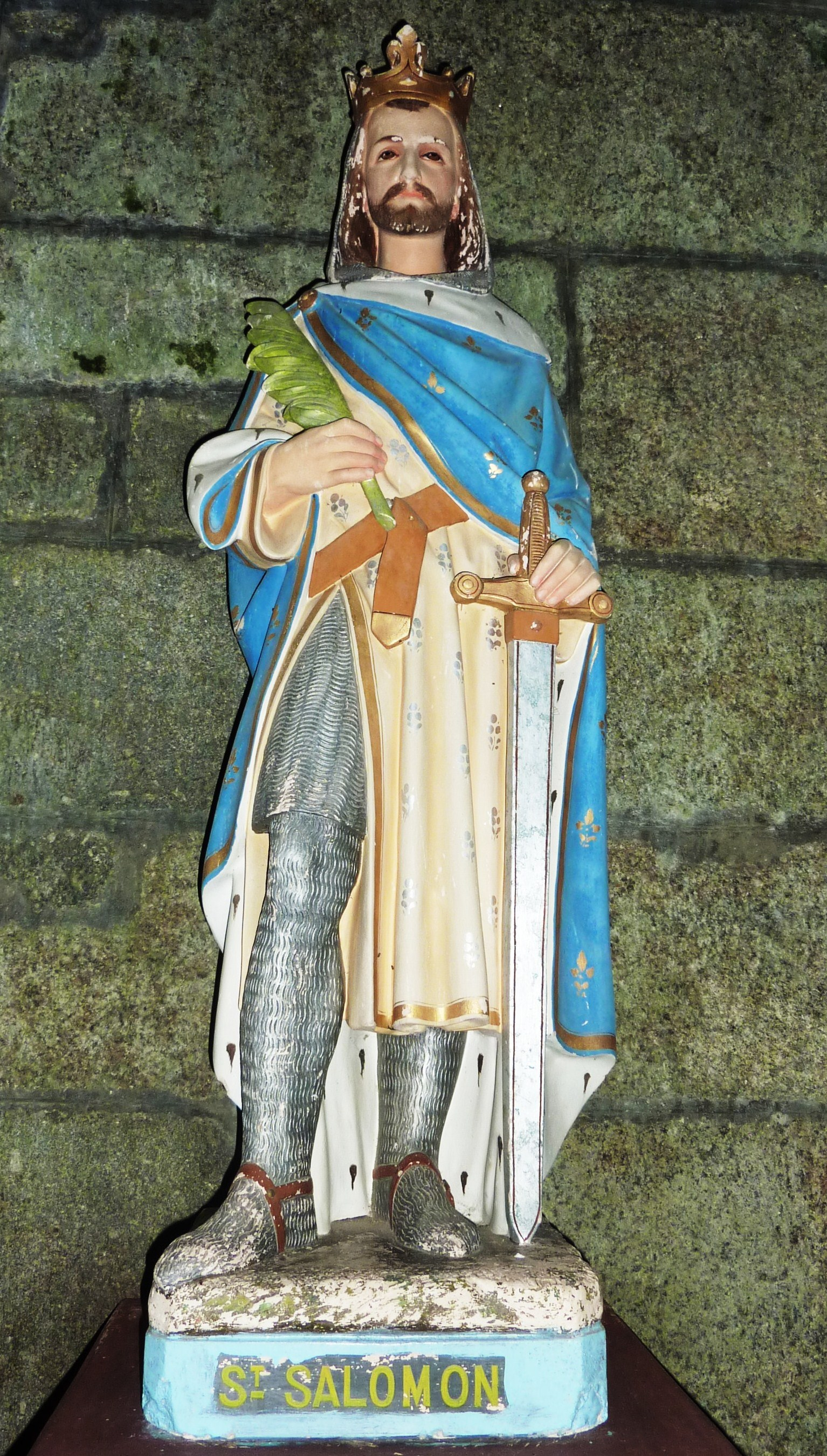 Plouyé: église paroissiale, statue de saint Salomon